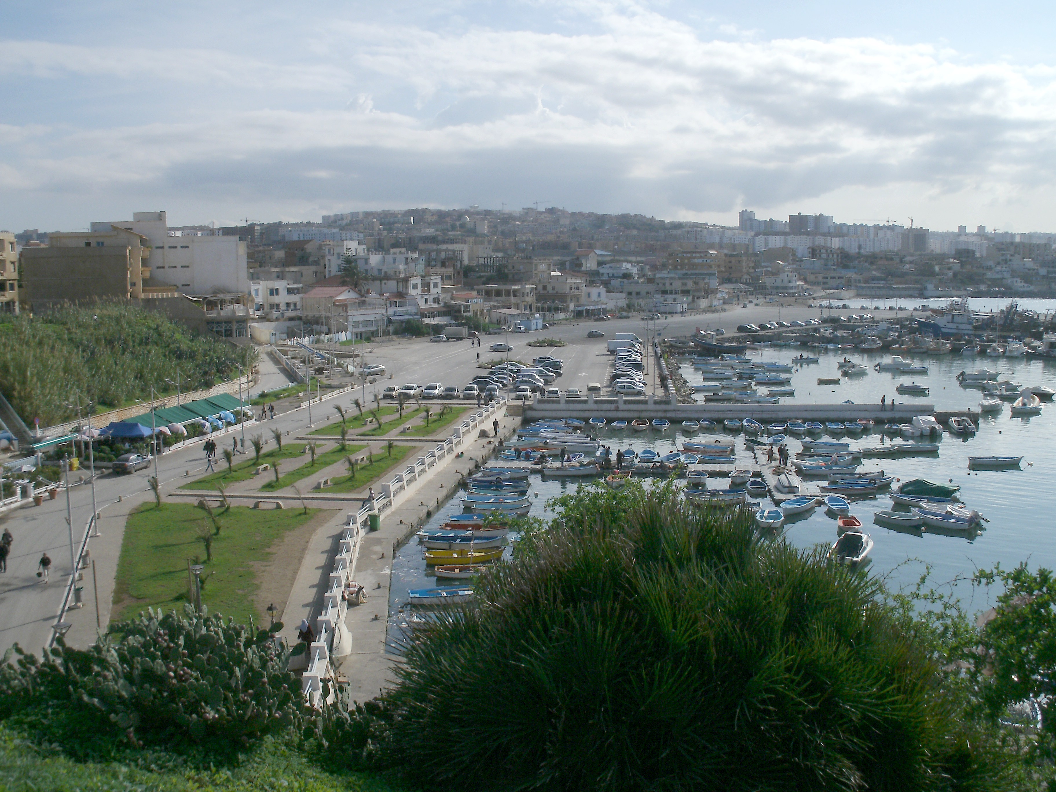 El Djamila ex la Madrague